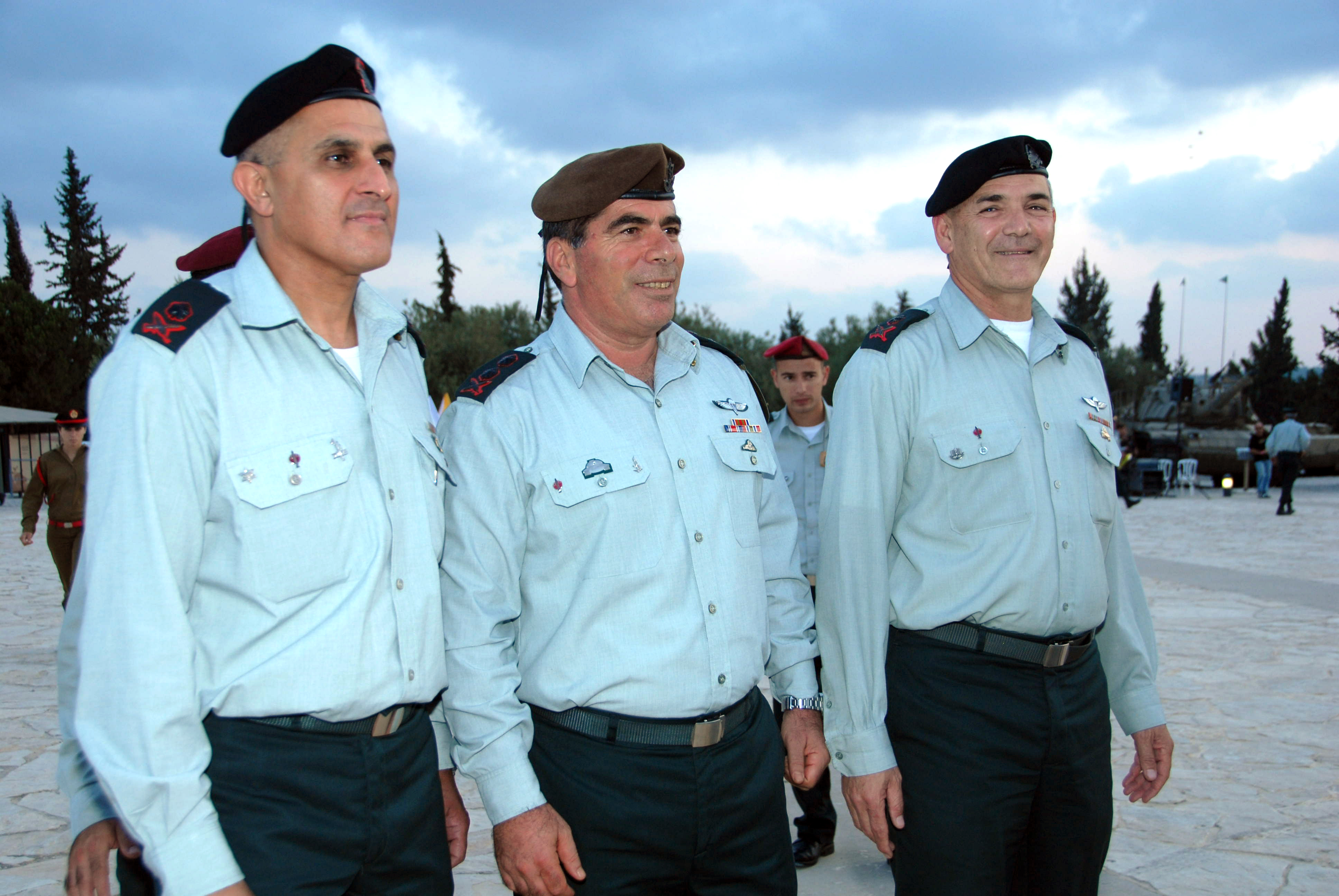 מפקד ז"י היוצא האלוף אבי מזרחי, הרמטכ"ל רב-אלוף גבי אשכנזי ומפקד ז"י הנכנס האלוף סמי תורג'מן, בטקס החלפת המפקדים.